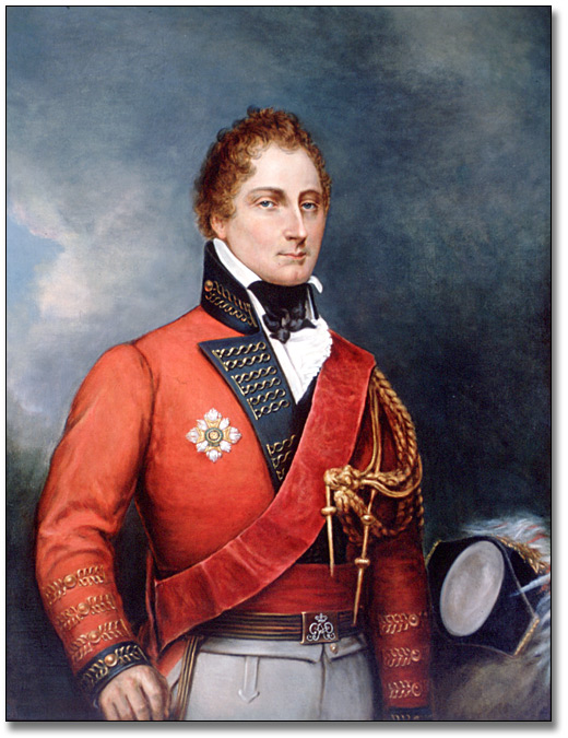 General Sir Gordon Drummond, GCB [Comm-in-Chief & Admin of UC 1812-14 and of UC and LC, 1814-16] Sir Gordon Drummond (27 septembre 1772 - 10 octobre 1854) était un militaire et administrateur colonial britannique. Il fut un des principaux commandants lors de la Guerre de 1812, président du gouvernement du Haut-Canada et brièvement administrateur de l'Amérique du Nord britannique. Il est né à Québec.